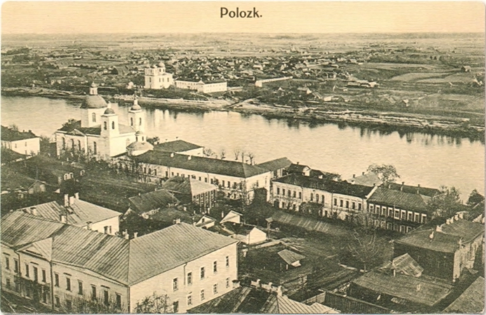 Беларуская (тарашкевіца): Полацак (Połacak), квартал на рагу вуліц Прабойнай (vulica Prabojnaja) і Вялікай (vulica Vialikaja)